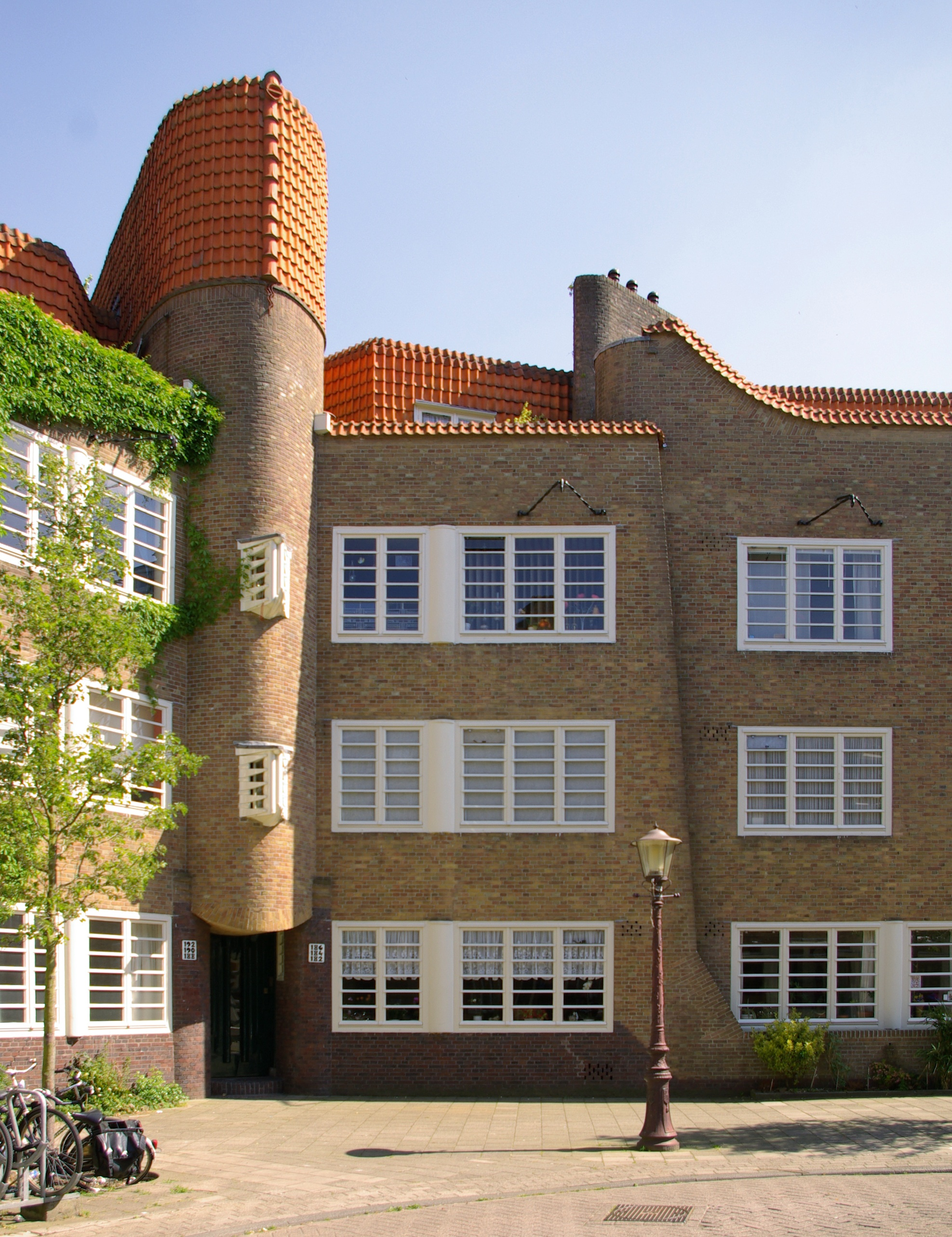 Complex van de woningbouwvereniging De Dageraad (1918-1923) in Amsterdam, architecten: Michel de Klerk en Piet Kramer 27″ N, 4° 54′ 01.8″ E